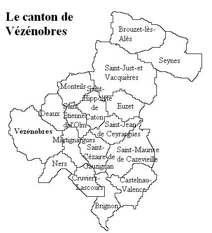 Le canton de Vézénobres Image personnelle